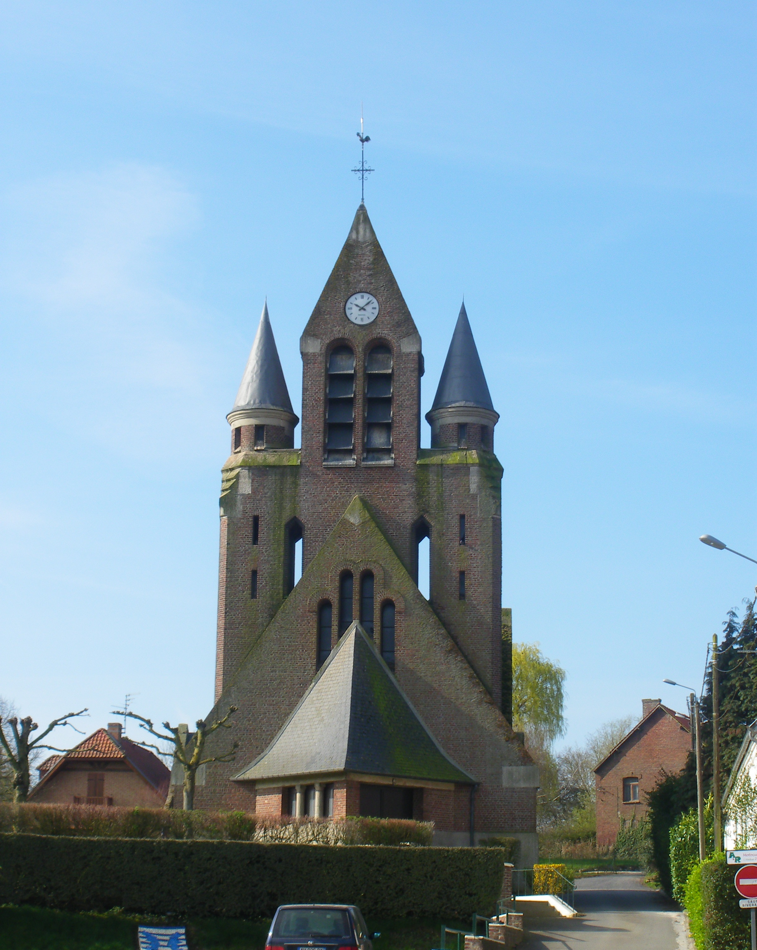 Vue de l'église Saint-Vaast de Douchy-lès-Ayette.